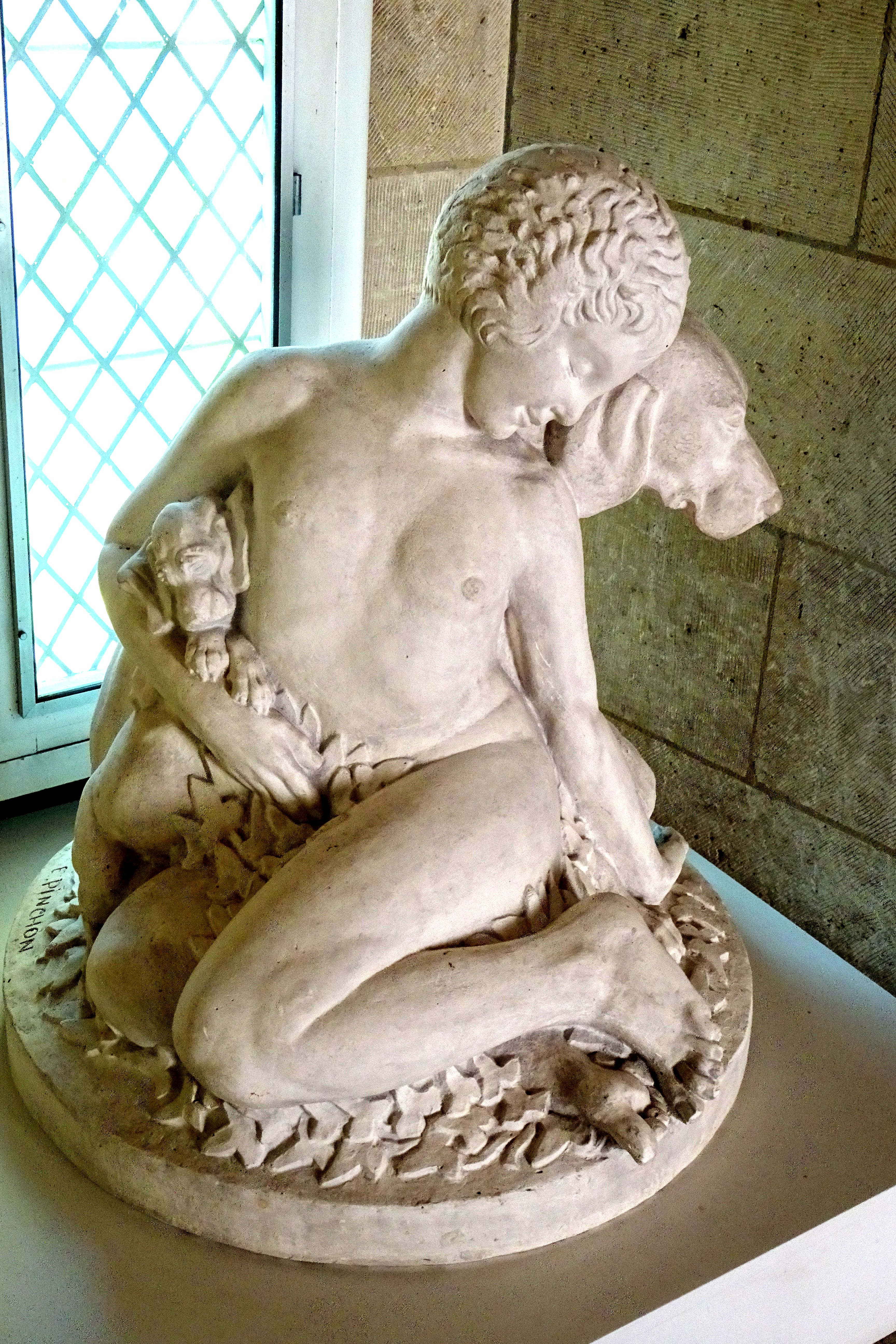 Groupe sculpté - Jeune fille et ses chiens, Émile Pinchon, plâtre, vers 1925, inv. MN 1521.